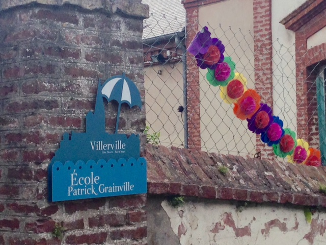 Panneau Ecole publique primaire "Patrick Grainville" à Villerville (depuis le 11 septembre 2014 par arrêté municipal)